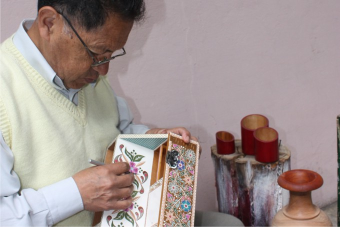 Elaboración de un bargueño por el Maestro Gilberto Granja, con la técnica Barniz de Pasto o Mopa Mopa